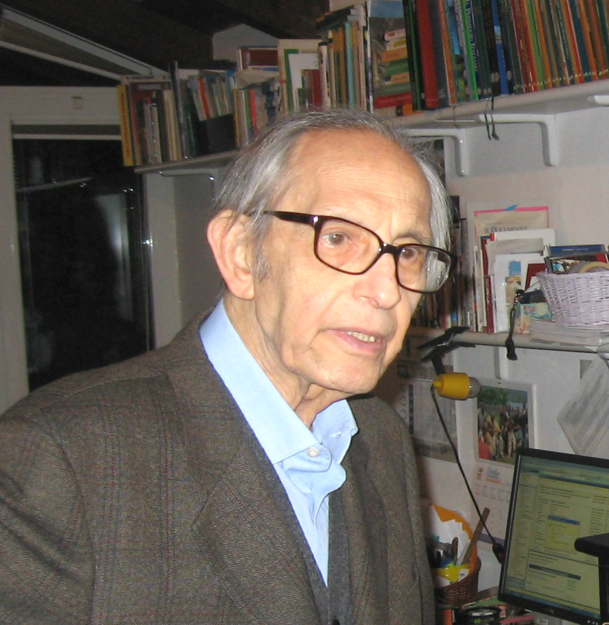 Lo psicoanalista triestino Silvio Graziadio Cusin